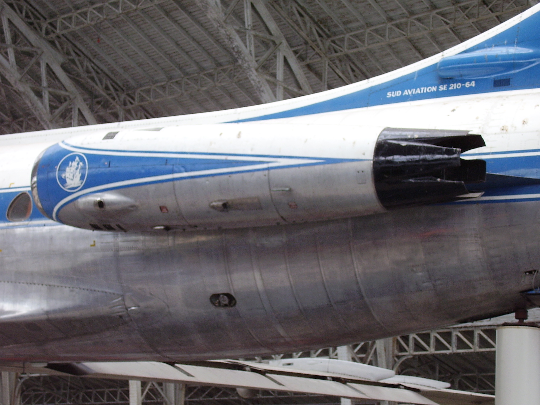 Royal Military Museum Brussels, Musée Royal de l'Armée, Koninklijk Museum van het Leger en de Krijgsgeschiedenis